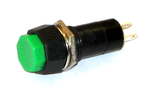 Elektra butono de formo de regula oklatero. Электрическая кнопка в форме правильного восьмиугольника.